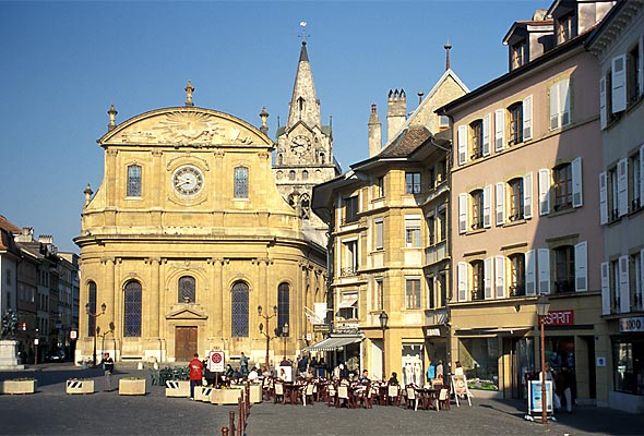 Stadtkirche von Yverdon-les-Bains